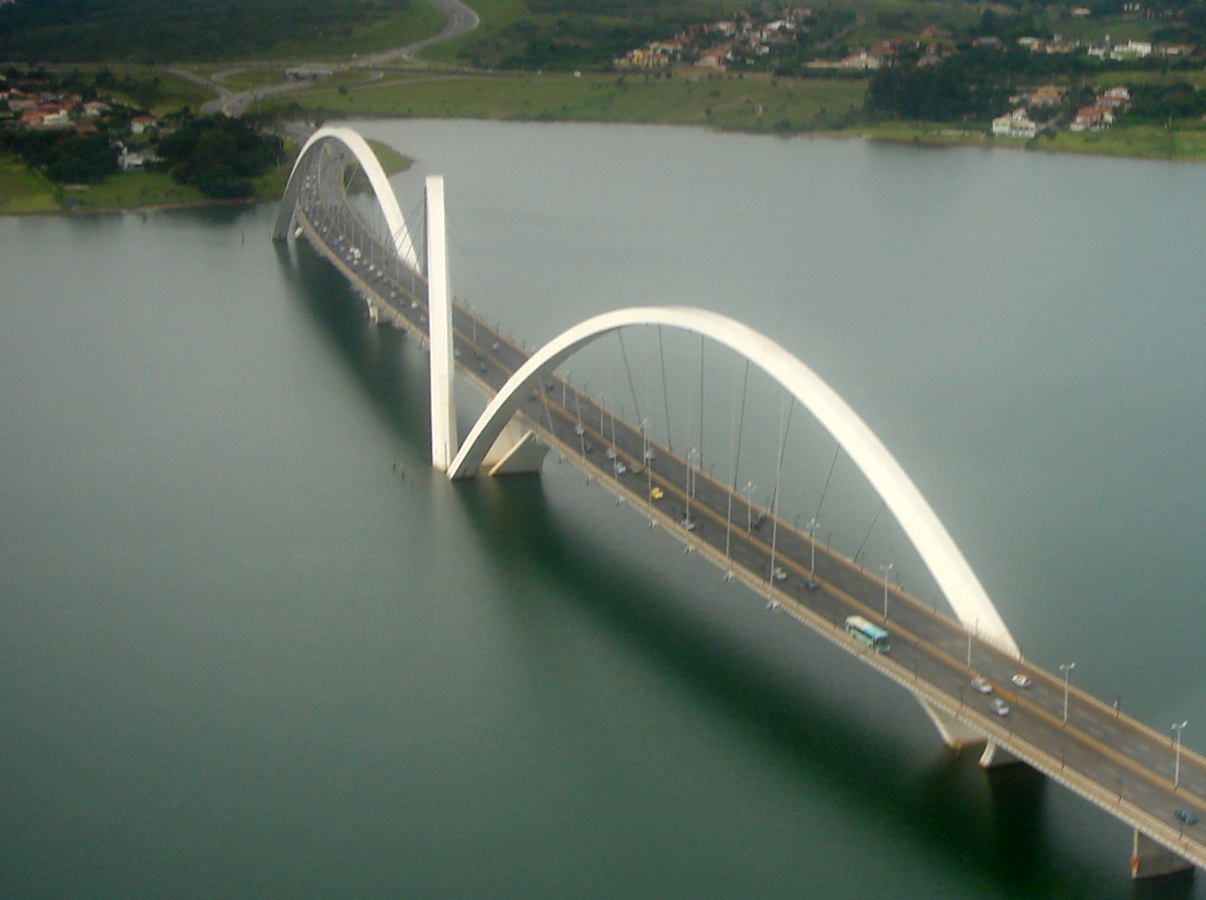 Aereal view Bridge Juscelino Kubitschek (Ponte JK), Brasilia, D.F., Brazil, 2006